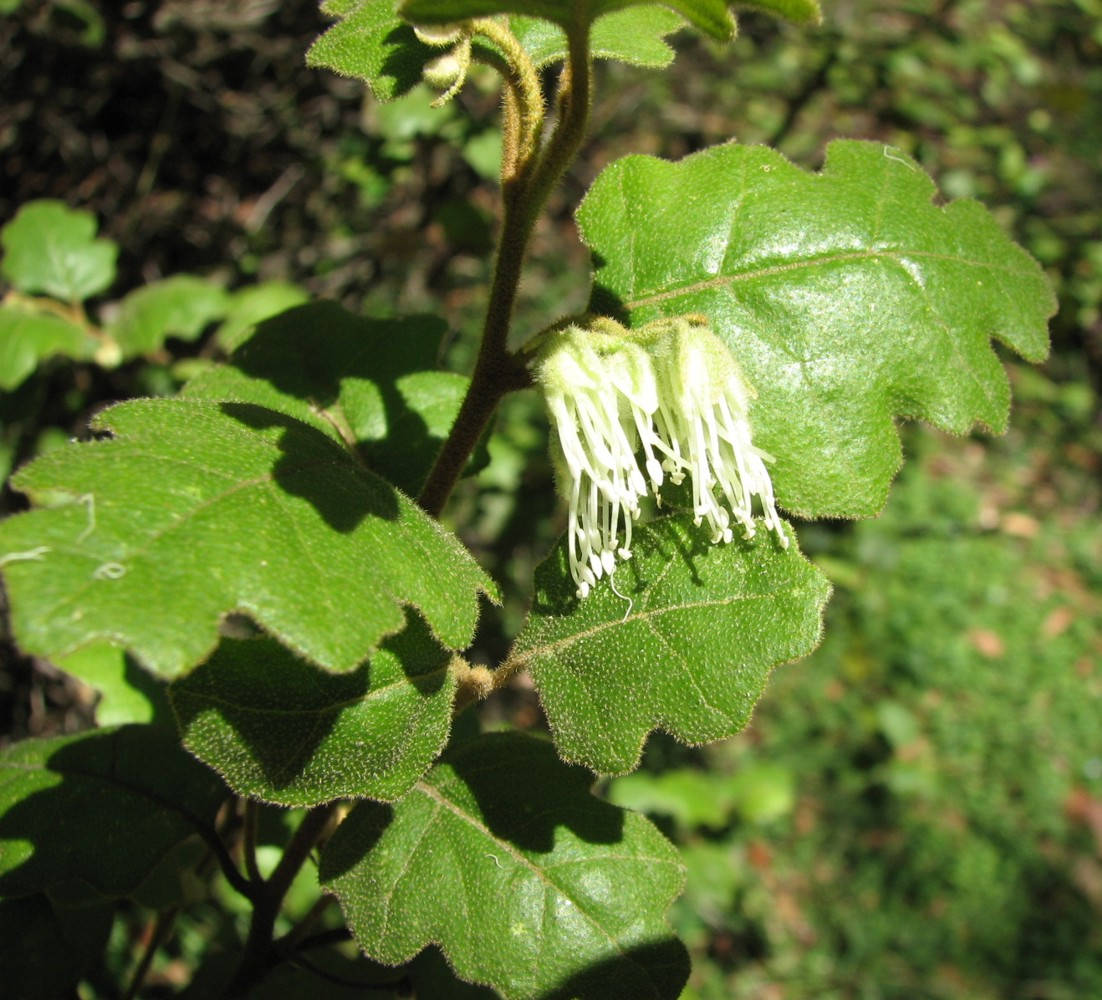 Chorilaena quercifolia, Karwarra Gardens, Kalorama, Victoria, Australia